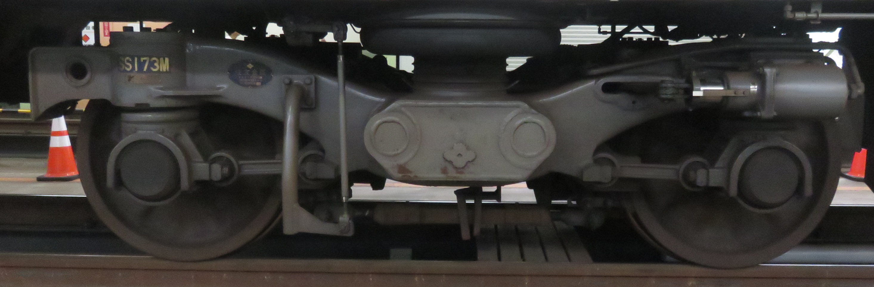 SS-173型台車